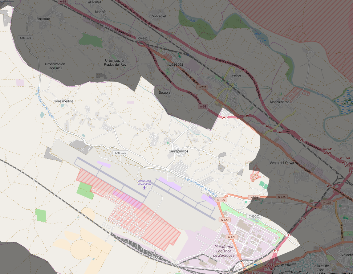 Mapa del distrito de Garrapinillos en Zaragoza.